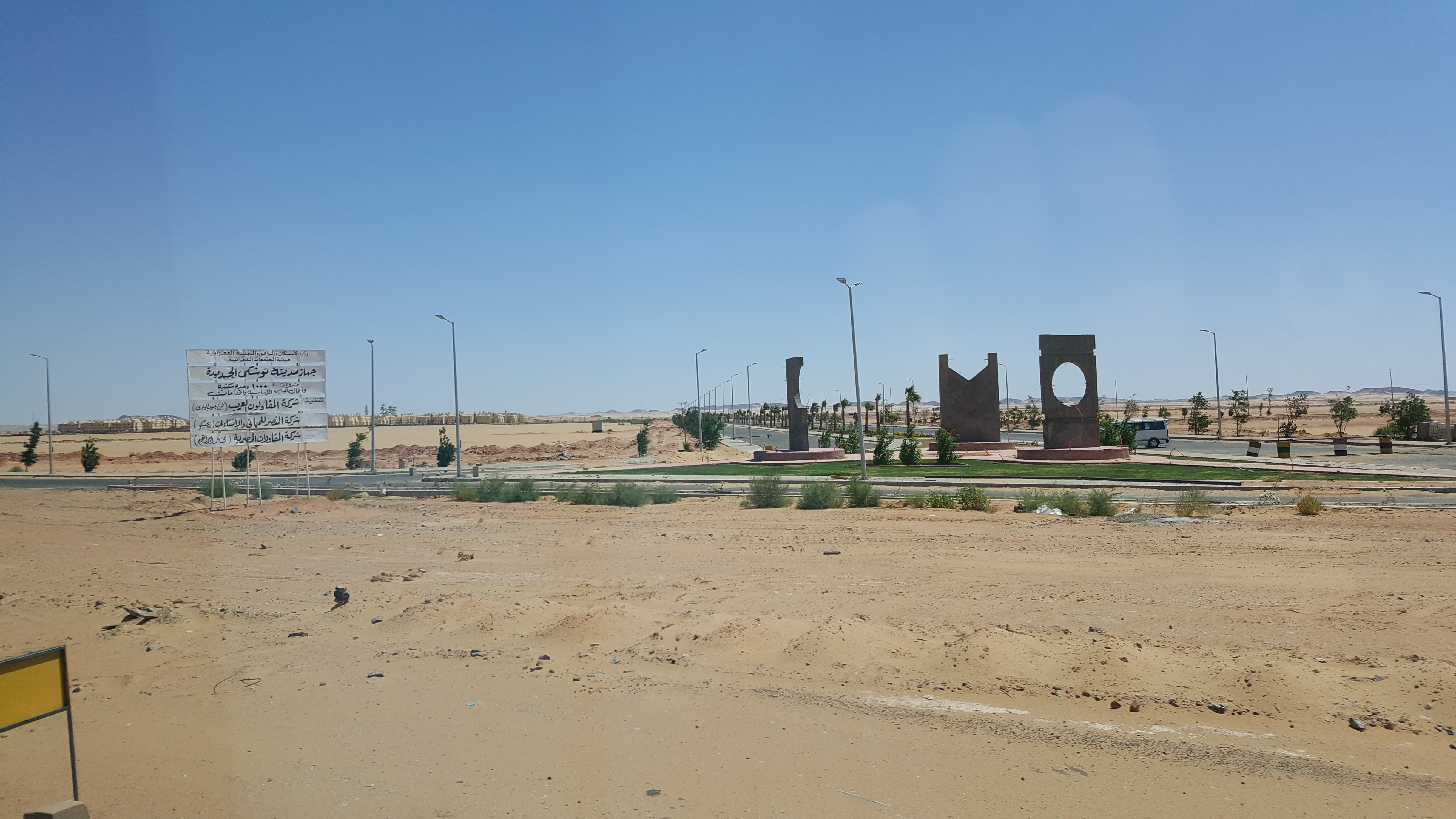 Toshka New City - New Valley Governorate